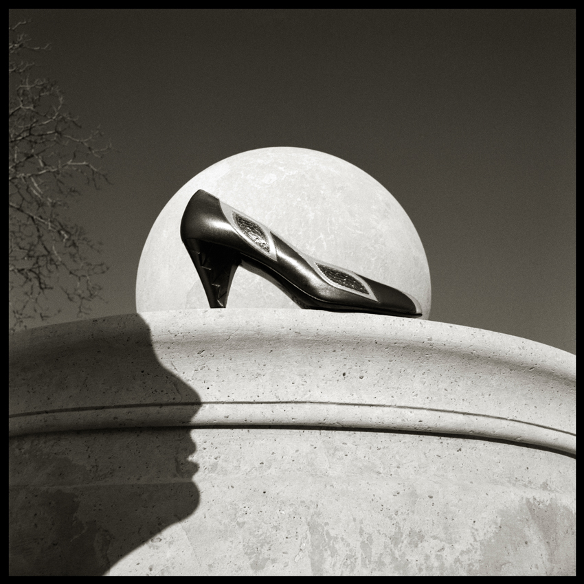 Augusto De Luca fotografo: pubblicità su Vogue Italia e Harper's Bazaar